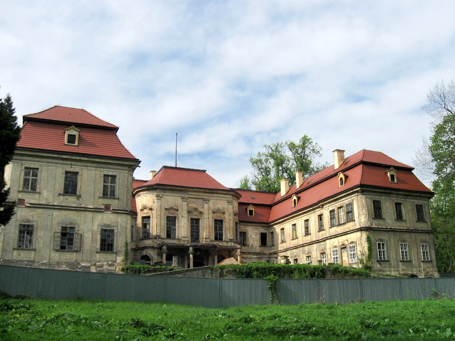 Grodziec - pałac 02.1959.